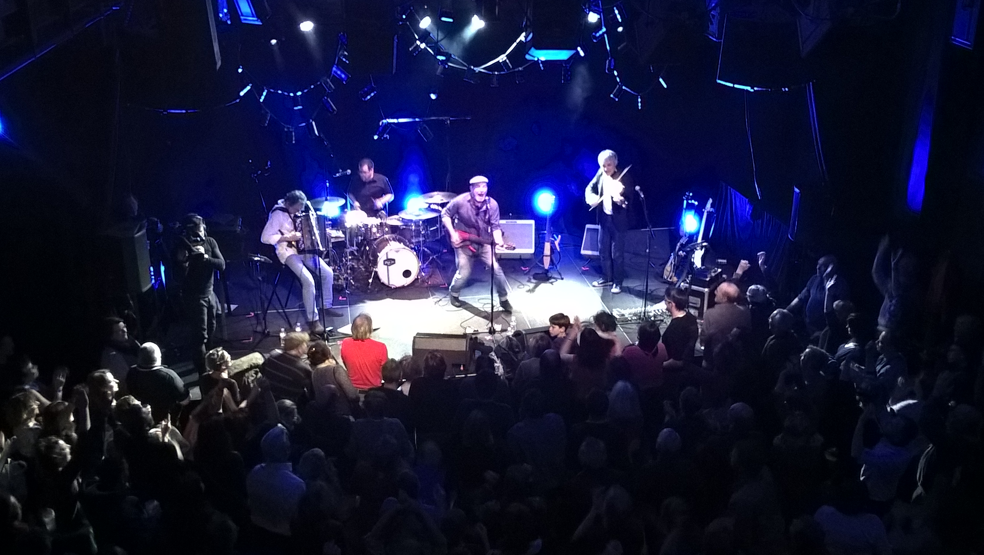 Red Cardell sur la scène du Novomax à Quimper